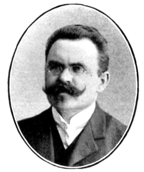 Władysław Seyda, member of Reichstag